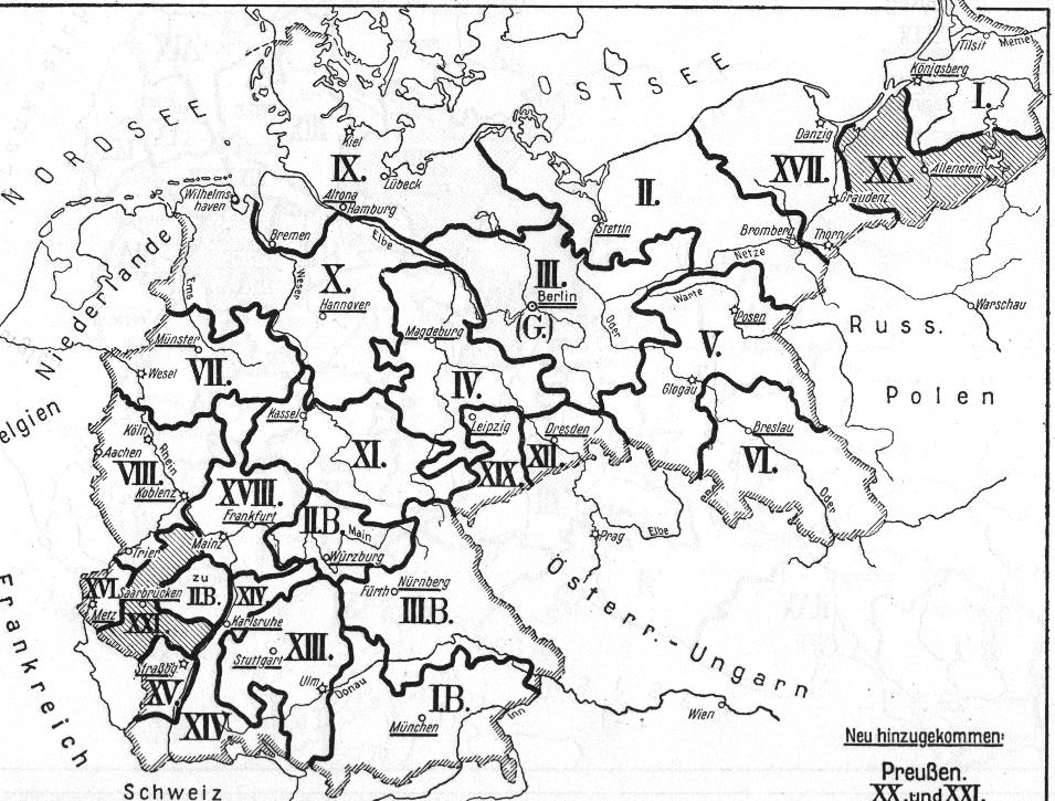 Armeekorpsbezirek 1914: Bereiche der deutschen Armeekorps Stand 1914